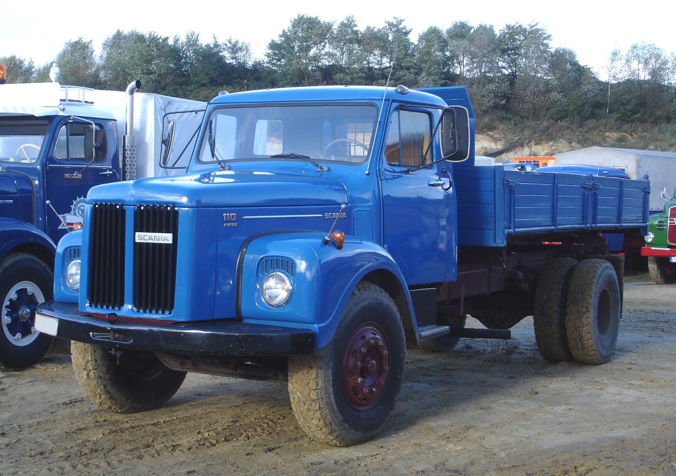 Scania L110-Super Pritschenkipper